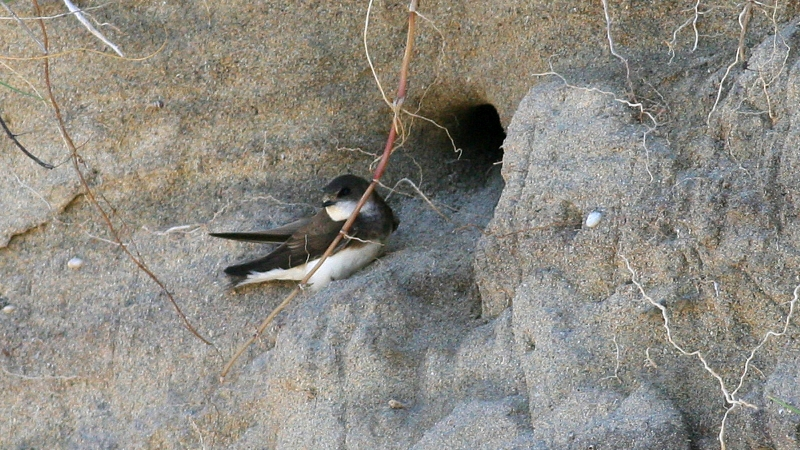 Sand Martin (Riparia riparia)